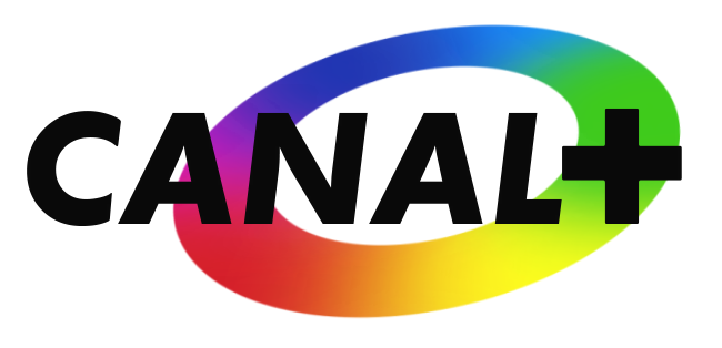 Logo de Canal+ réalisé par Étienne Robial et Mathias Ledoux. Logo de 1984 (Variante)